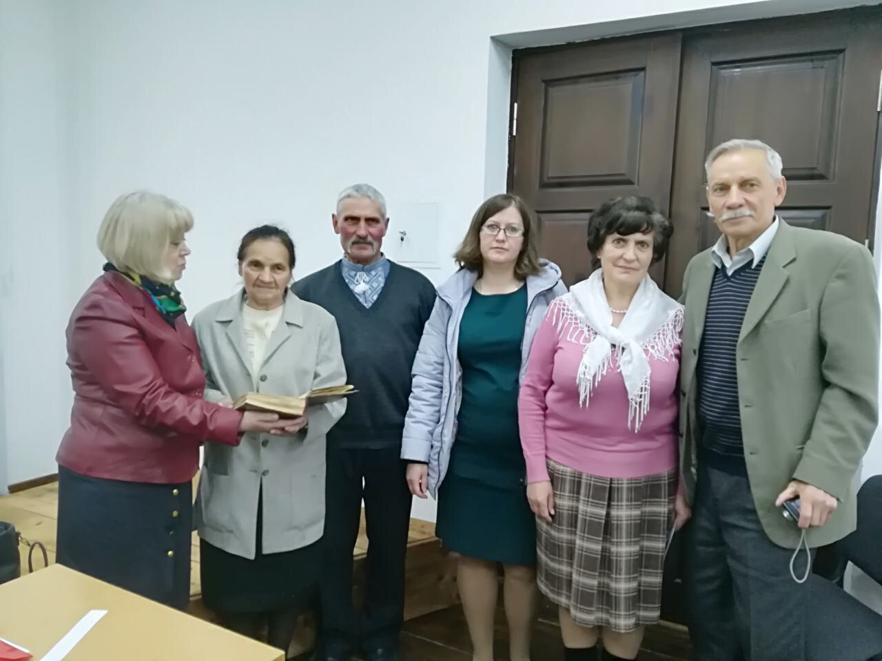 Головацька Галина Пертрівна (друга зліва) в Затурцівському музеї дарує книгу